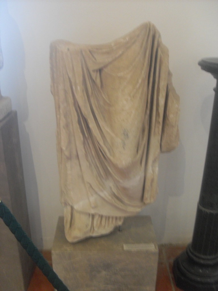 Frammento di statua femminile panneggiata forse identificabile con Cerere, rinvenuta nel 1794 presso la chiesa di S. Pietro, copia romana del I secolo d.C. da un originale del IV secolo a.C.